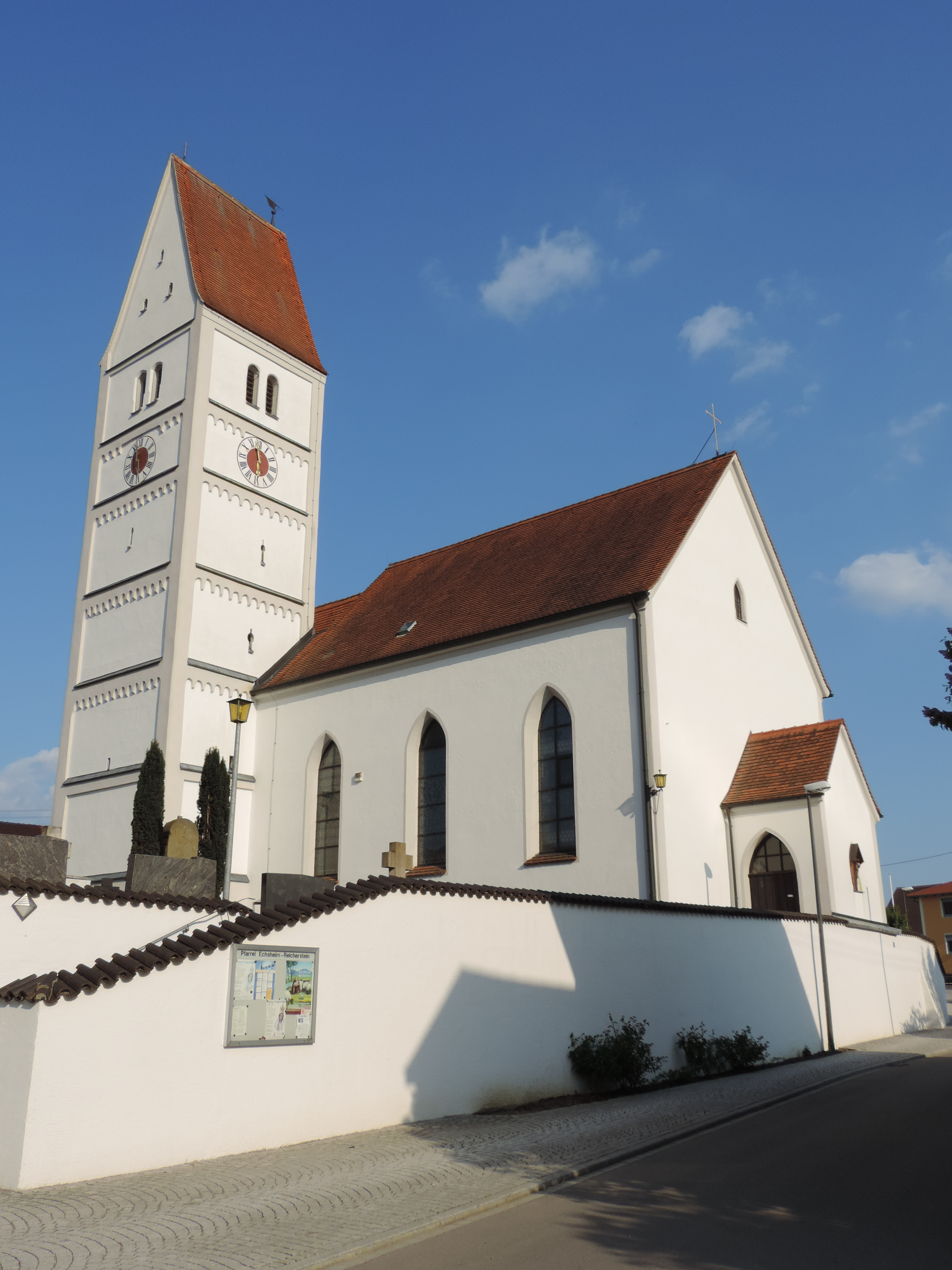 Außenansicht